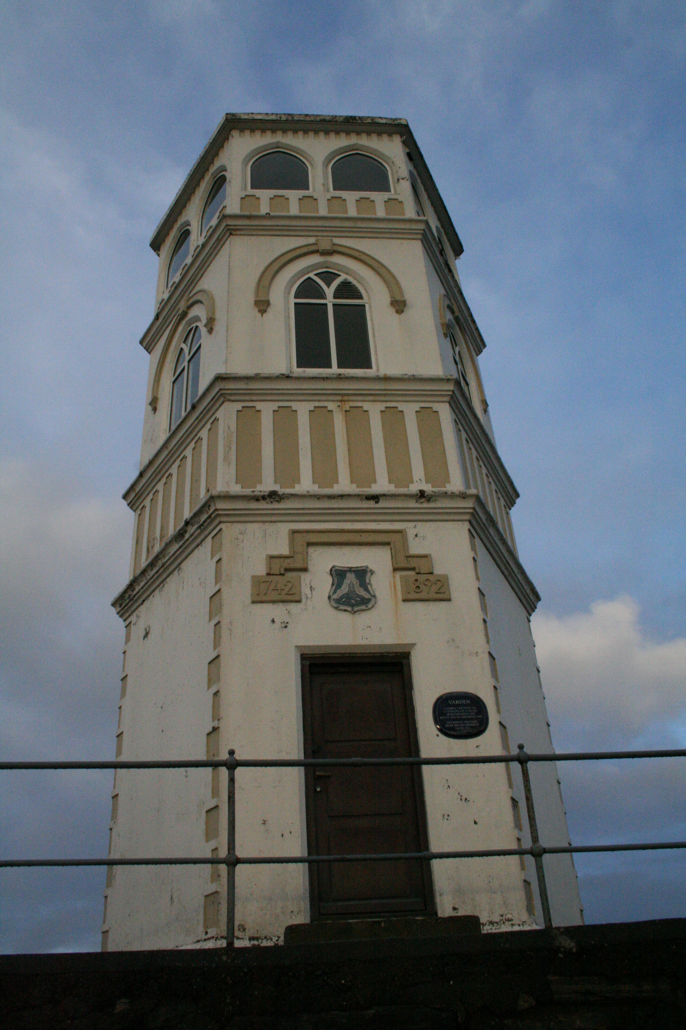 Varden Kristiansund